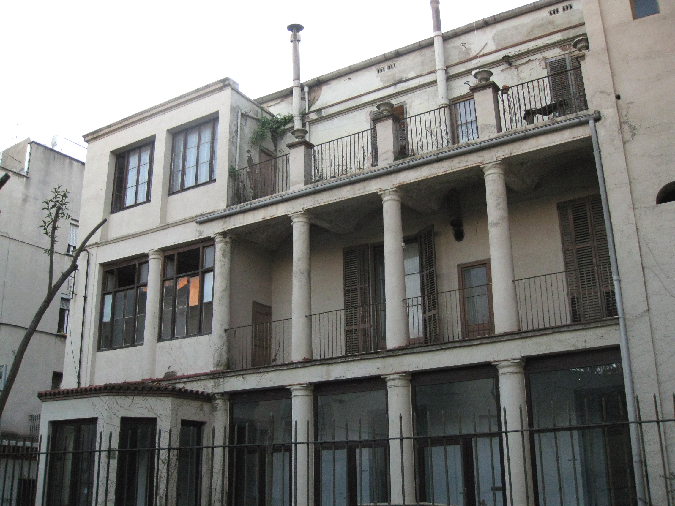 Casa Mariano Ros, al carrer de l'Església núm. 17, a la cantonada amb el Portal Nou (Terrassa). Edifici del final del segle XIX. Vista de la galeria posterior.